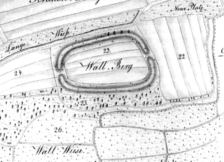 Gernandesburg